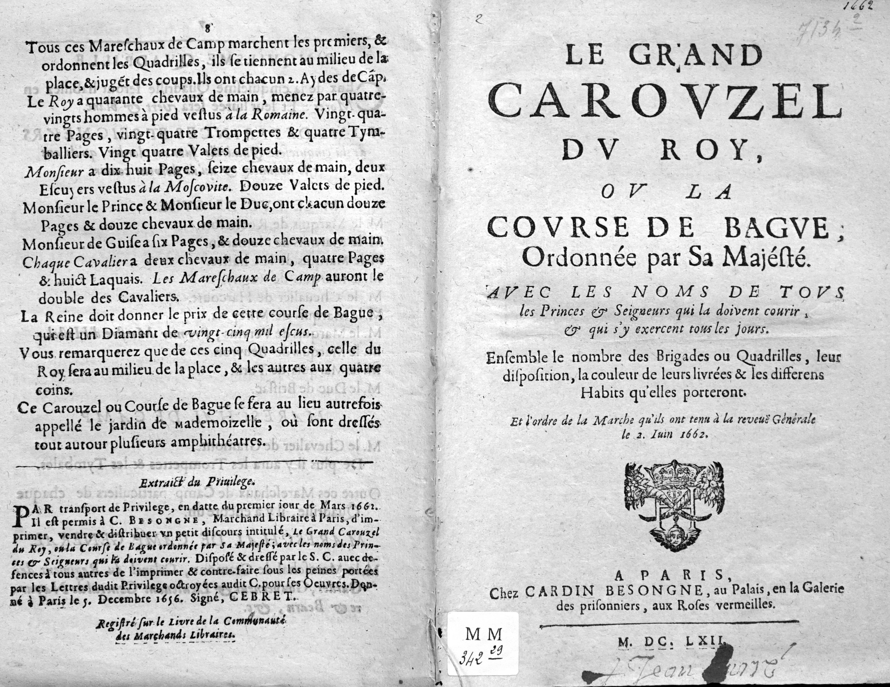 tiré d'un imprimé du XVIIe siècle.